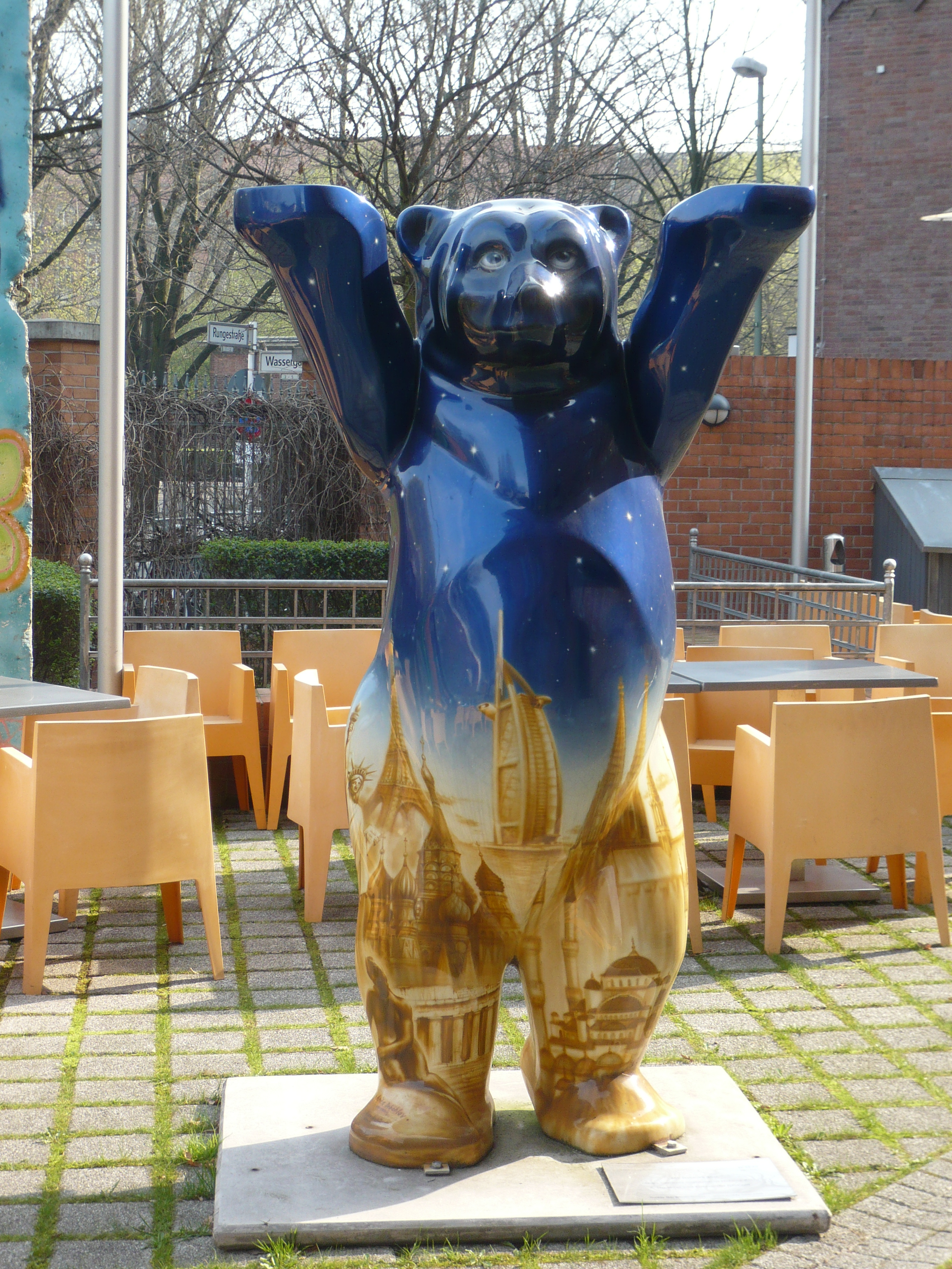 Berlin-Mitte; Buddy Bear vor dem Köllnischen Gymnasium in der Wallstr.